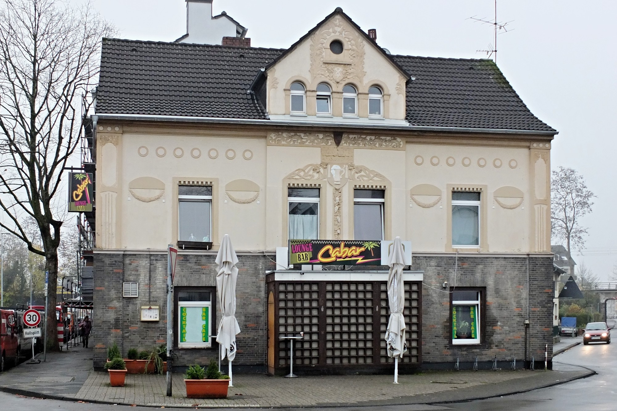 Relief: Wappenschild und Palmzweig, Hilden, Richrather Straße 1